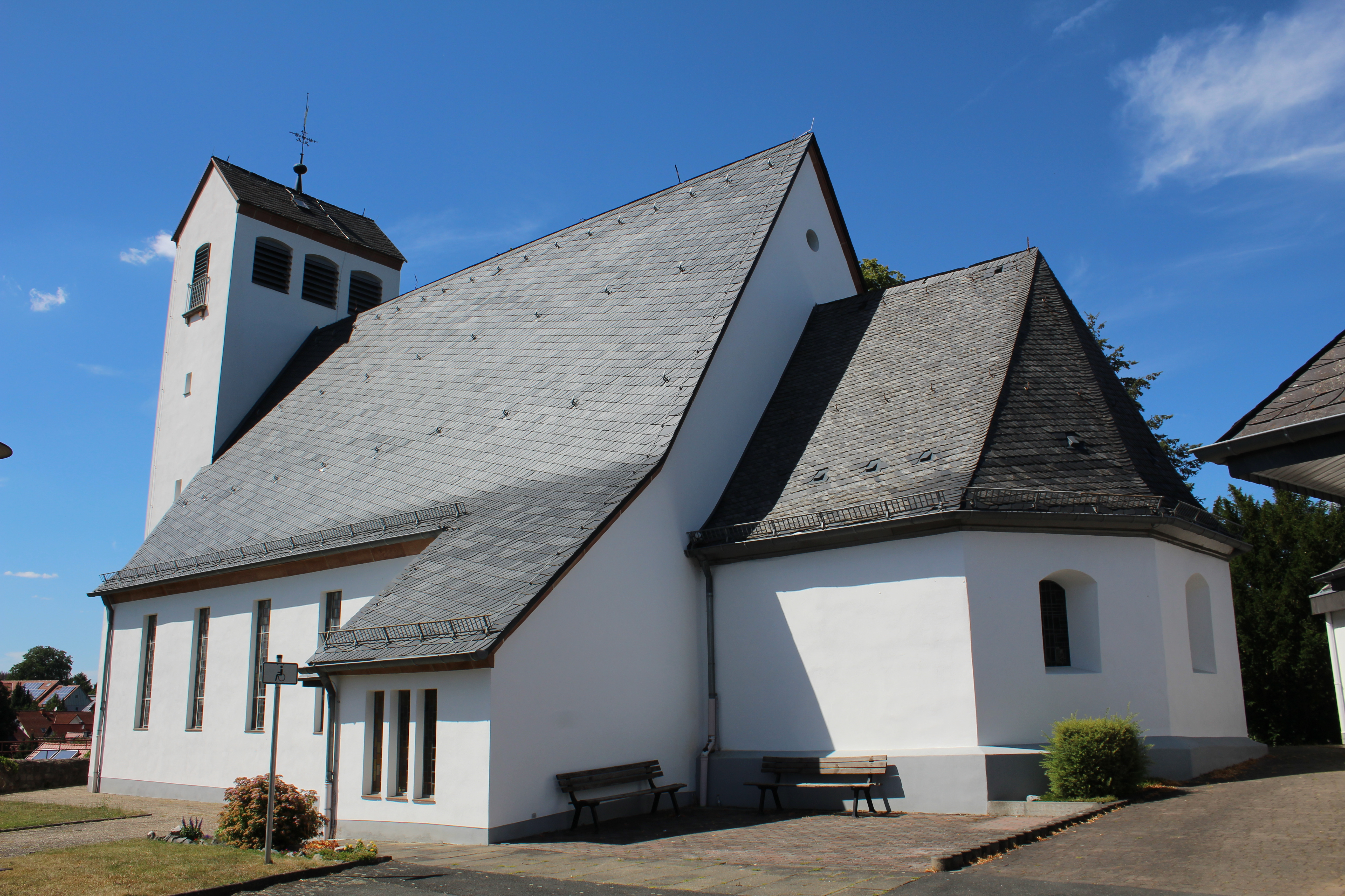 Evangelische Kirche Niederwetz, Gemeinde Schöffengrund, Hessen, Deutschland